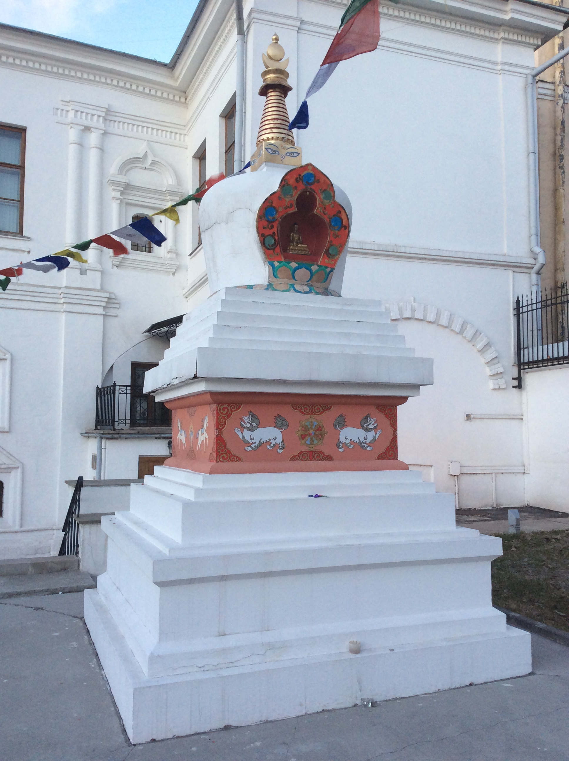 Ступа просветления во дворе музея Рерихов В Москве.